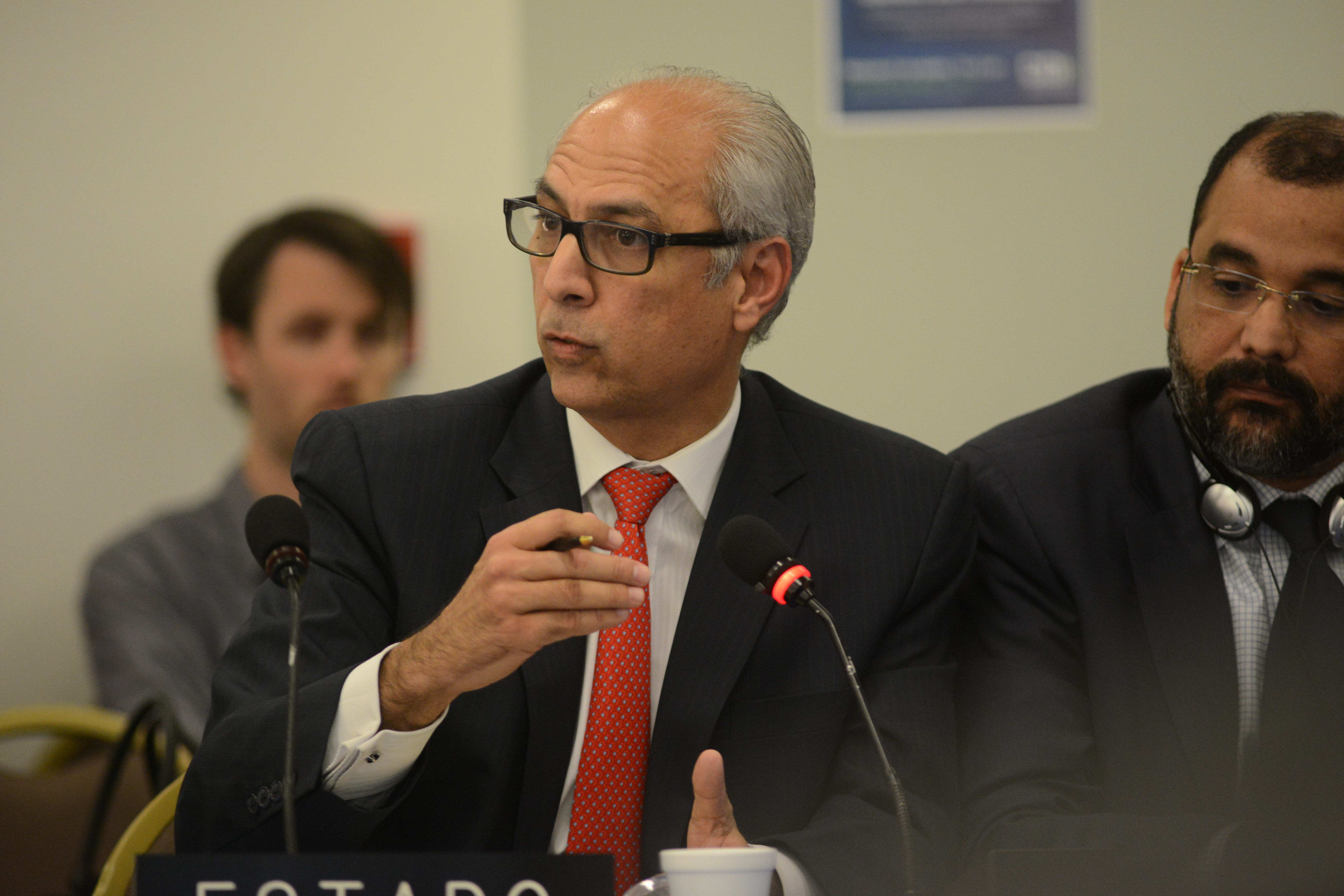 Flavio Darío Espinal ante la Comisión Interamericana de los Derechos Humanos (CIDH) en Washington DC